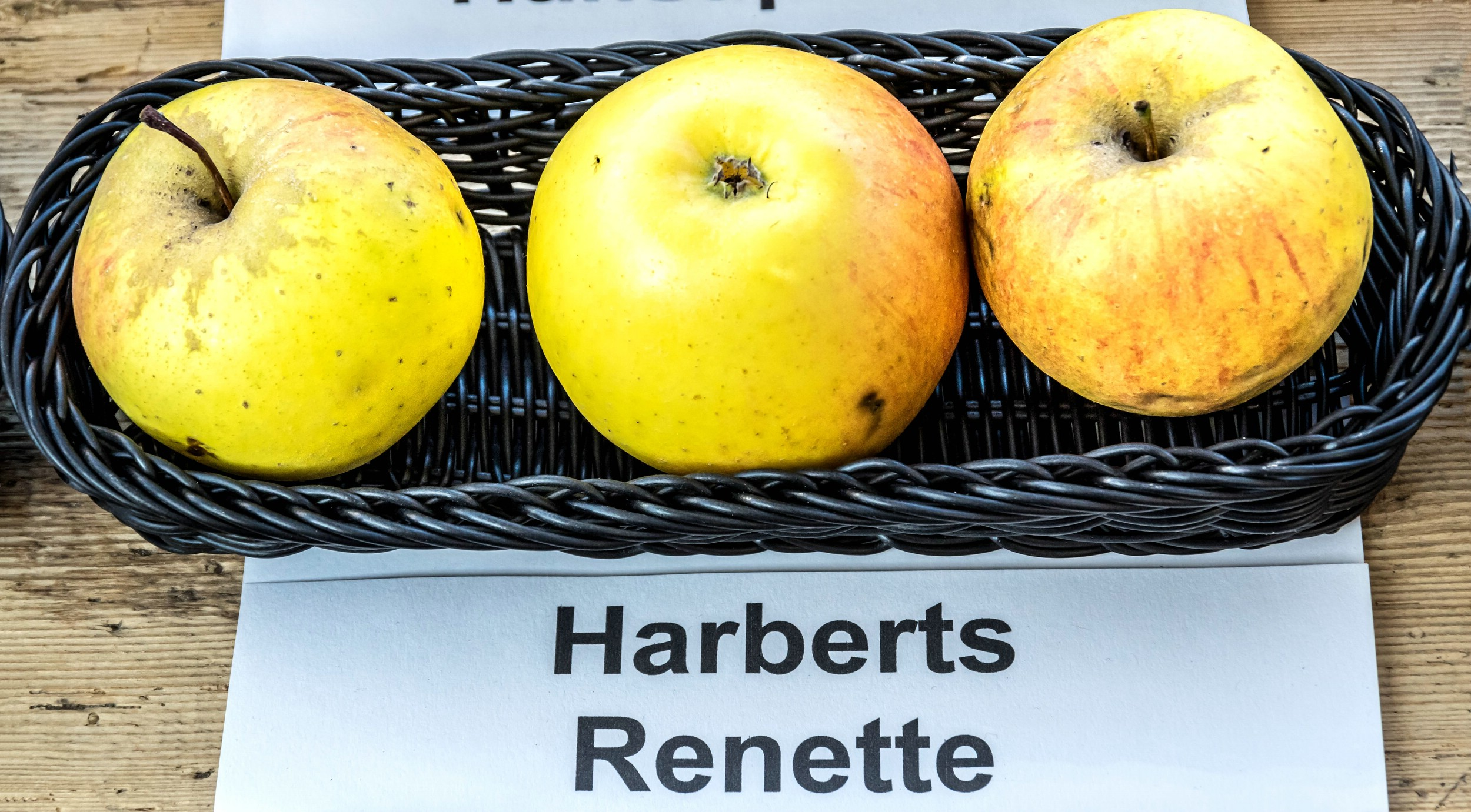 Alte Apfelsorten, von denen es im Badischen noch tragende Bäume gibt. Alle Aufnahmen au dem Oktober 2015